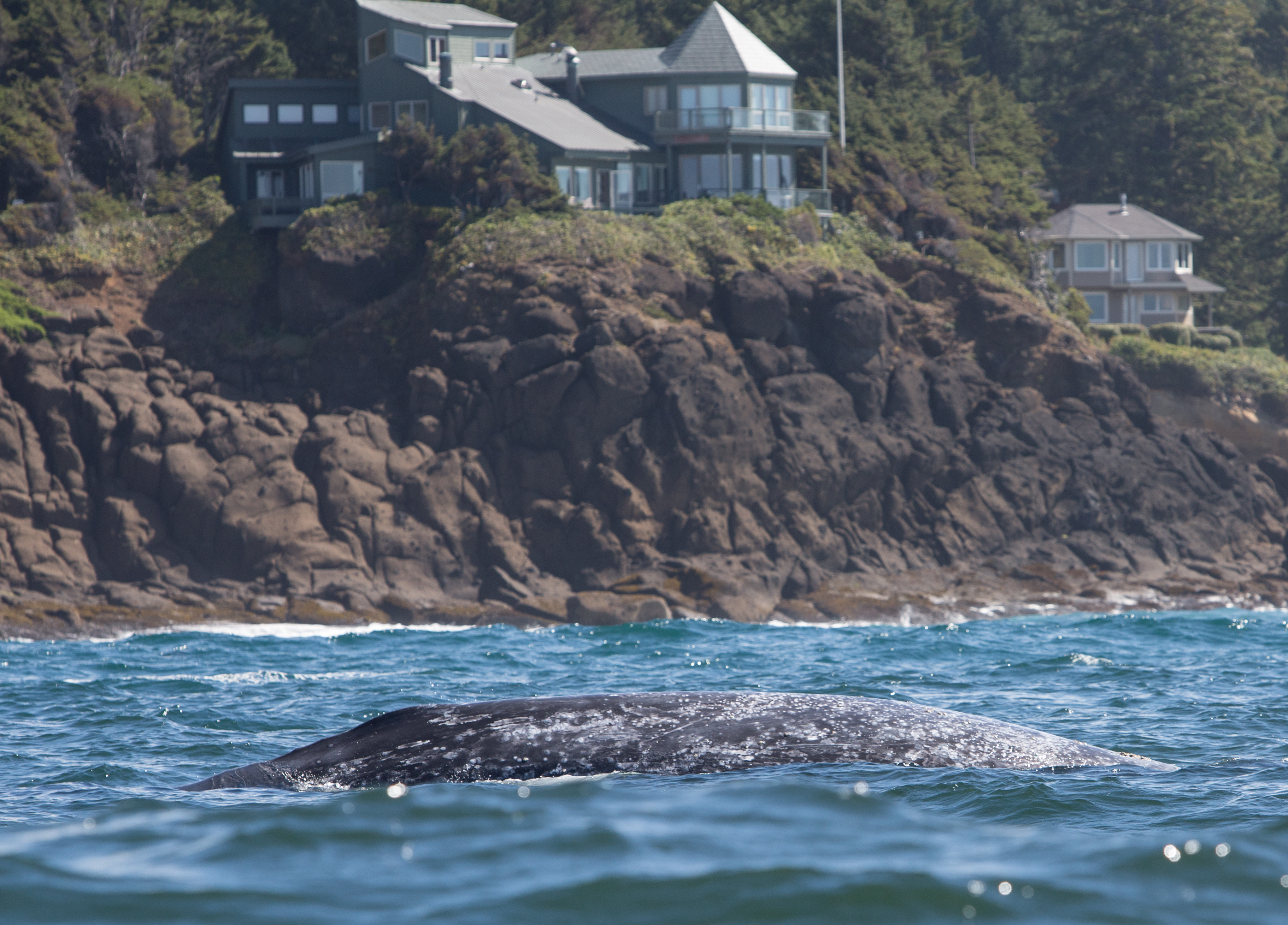 Gray whale